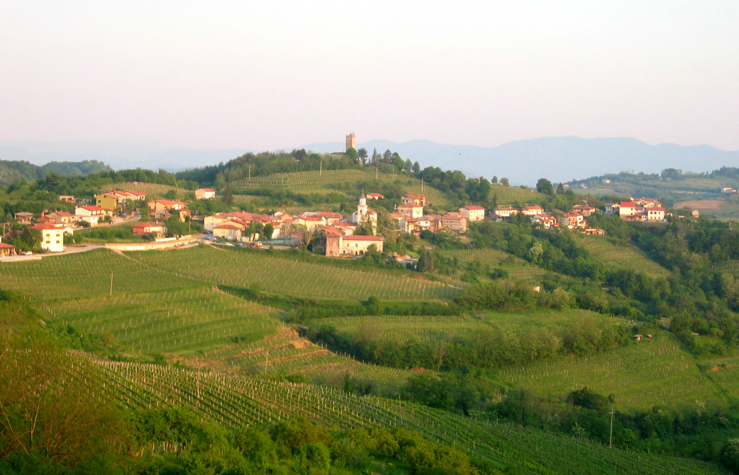 Hum, village in Goriška Brda region, Slovenia